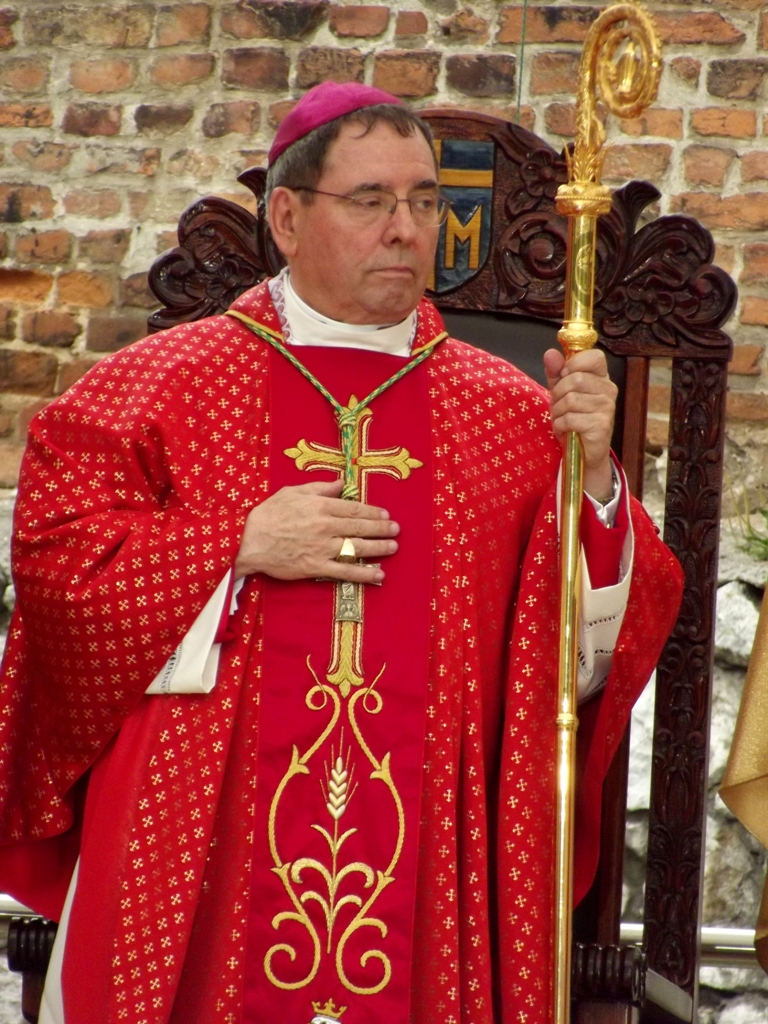 Zdjęcie zrobione podczas tradycyjnej procesji z Wawelu na Skałkę w Krakowie.